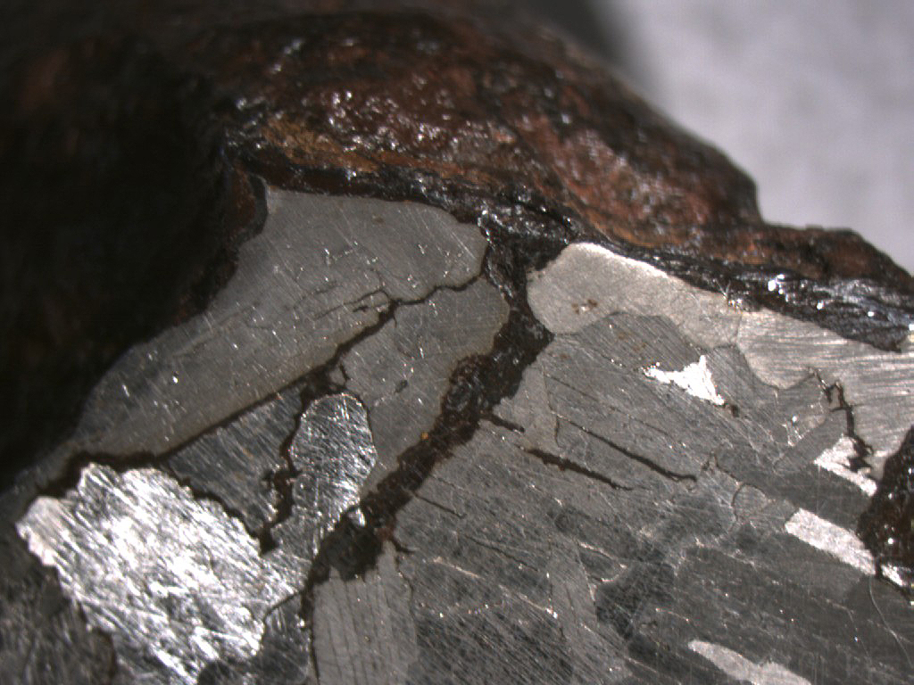 Widmannstättensche Figuren im Eisenmeteorit (Mundrabilla/Australien) unter dem Mikroskop.